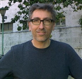 David Trueba en 2012 delante del cine Sacher, de Nanni Moretti, en Roma.